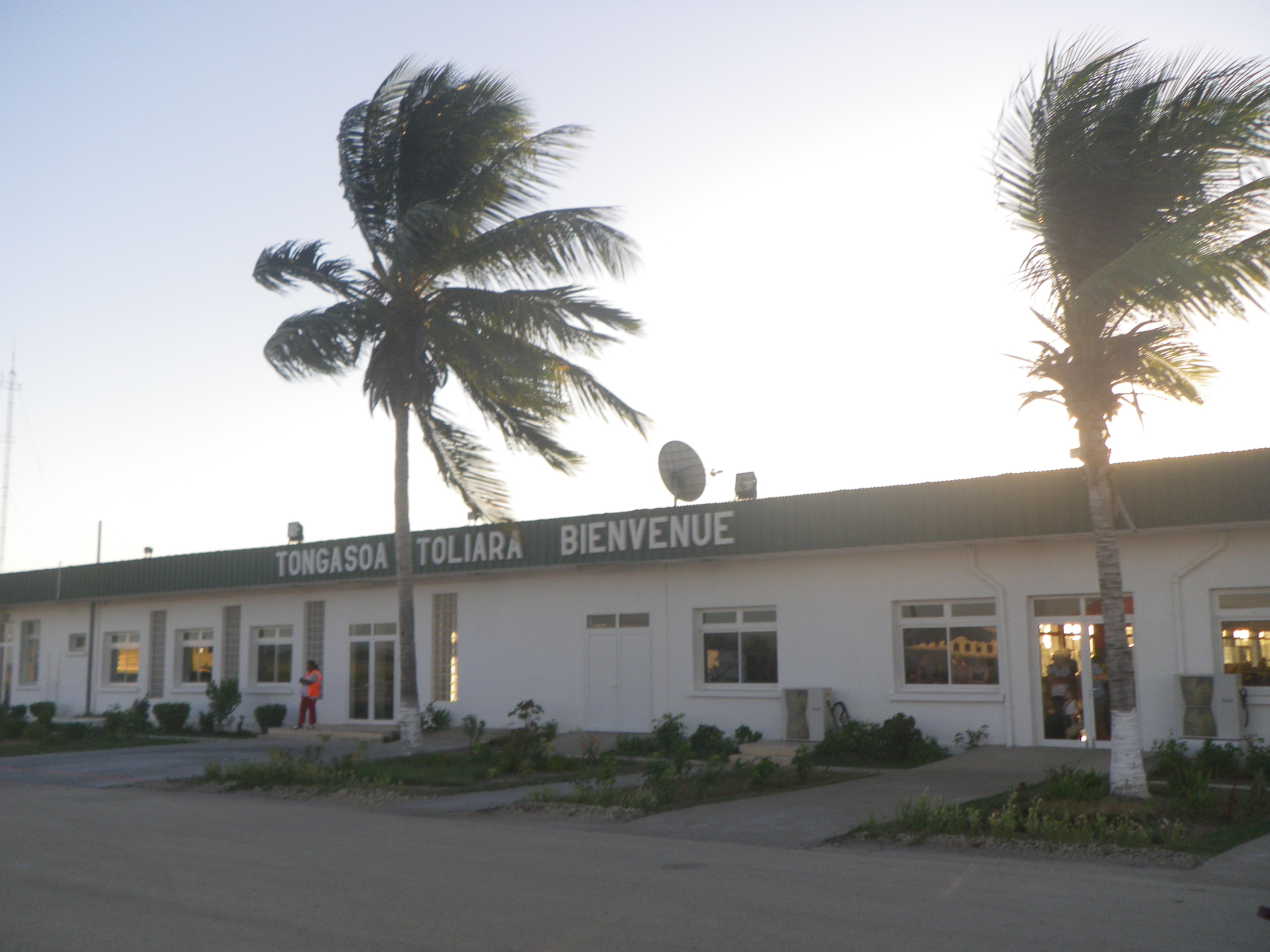 Aeroporto di Tulear visto dall'interno, foto scattata il 29 marzo 2011, pochi mesi dopo le palme che si vedono nella foto furono abbattute